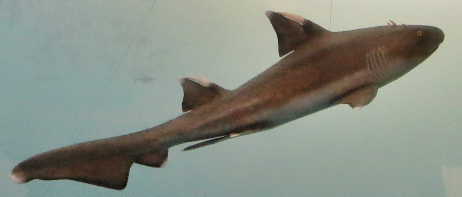 Model of Hybodus- Took the picture at Museum am Lowentor, Stuttgart